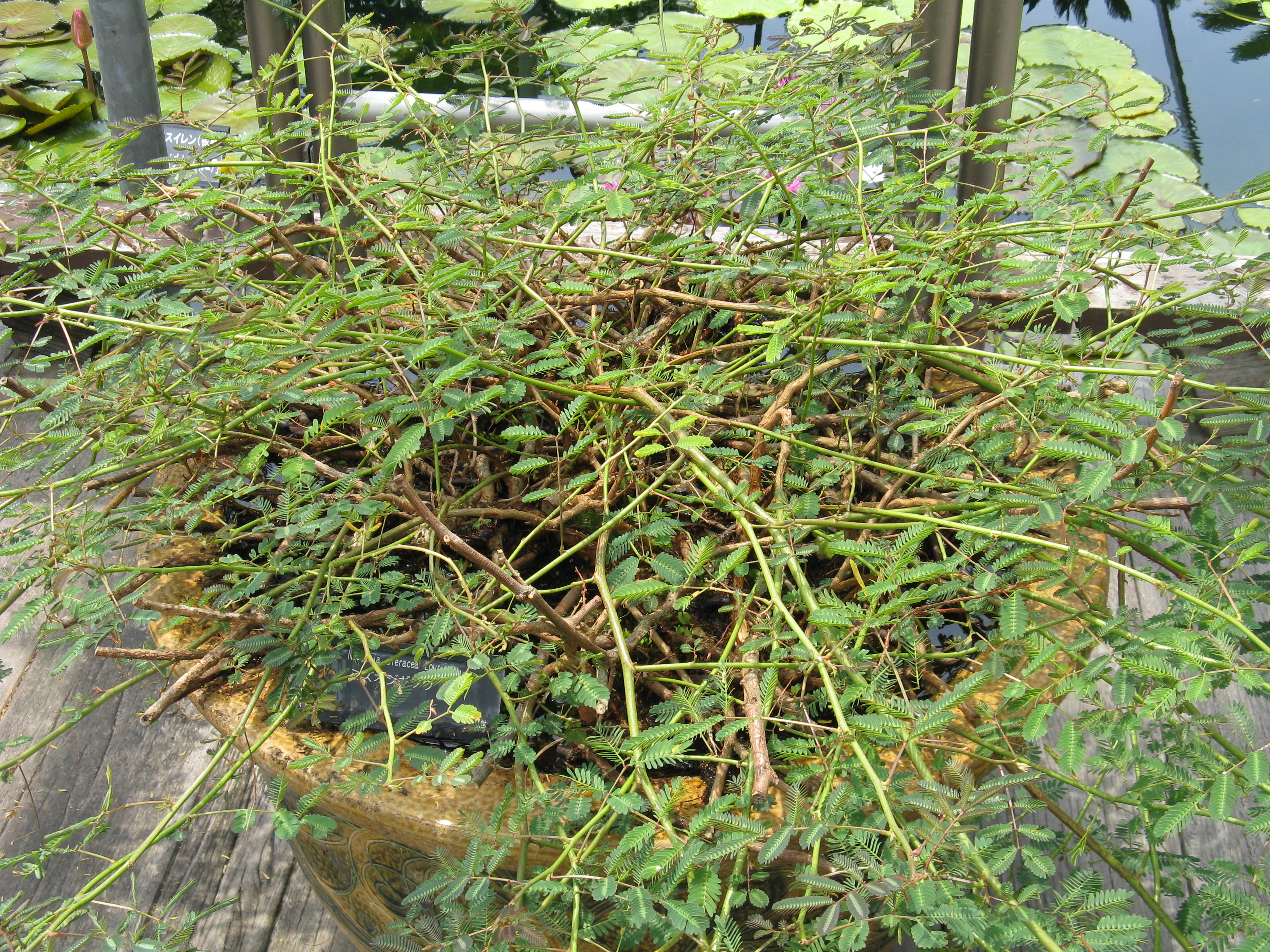 Scientific name Neptunia oleracea